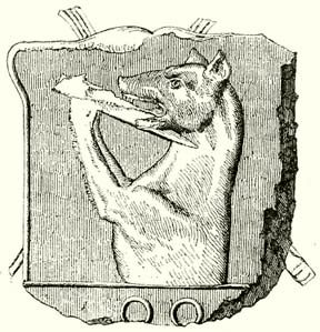 MÁRKI SÁNDOR DÓSA GYÖRGY 1470-1514 A MAGYAR TUDOMÁNYOS AKADÉMIA SEGÉLYEZÉSÉVEL KIADJA A MAGYAR TÖRTÉNELMI TÁRSULAT SZERKESZTI DR. DÉZSI LAJOS BUDAPEST AZ ATHENAEUM R.-T. KÖNYVNYOMDÁJA 1913